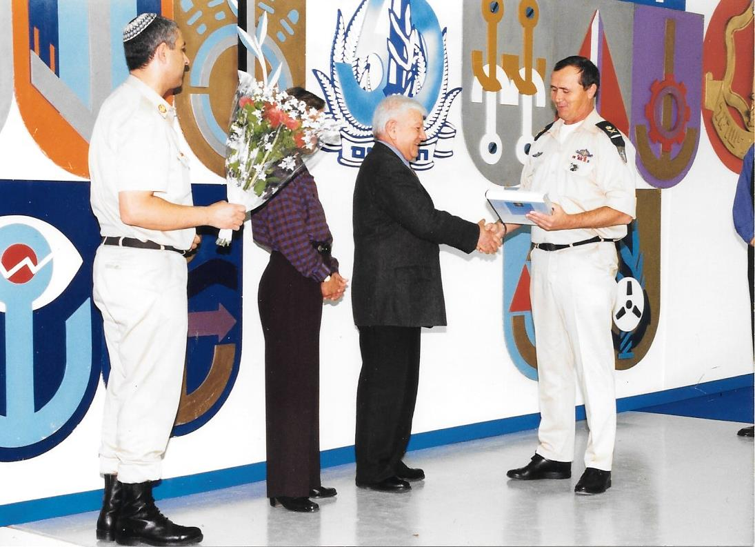 בטכס קבלת תעודת הערכה ממפקד חיל ים אלוף אלכס טל כרס"ן מילואים מתנדב מצטיין 1998